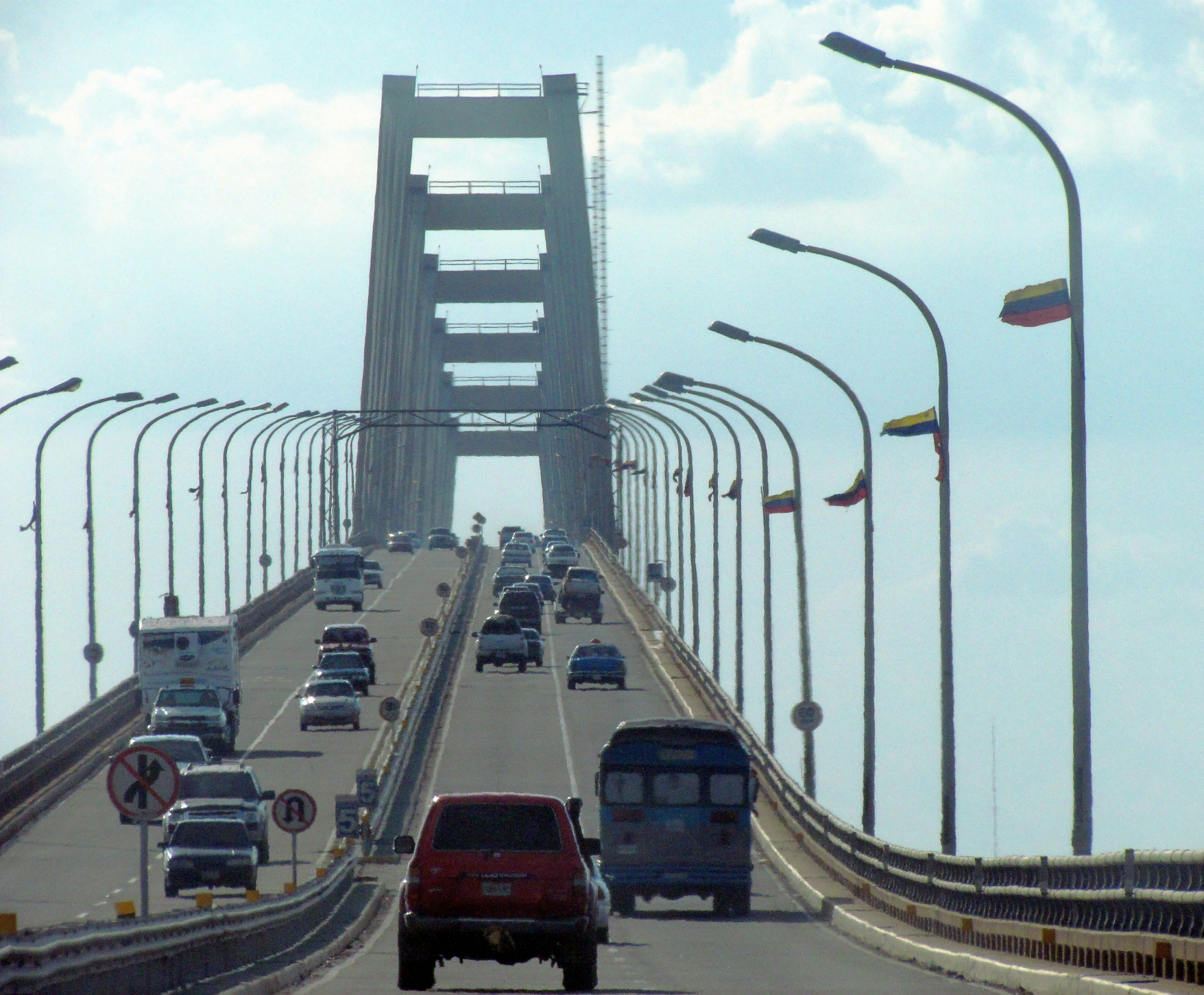 Cruzando el Puente sobre el Lago de Maracaibo